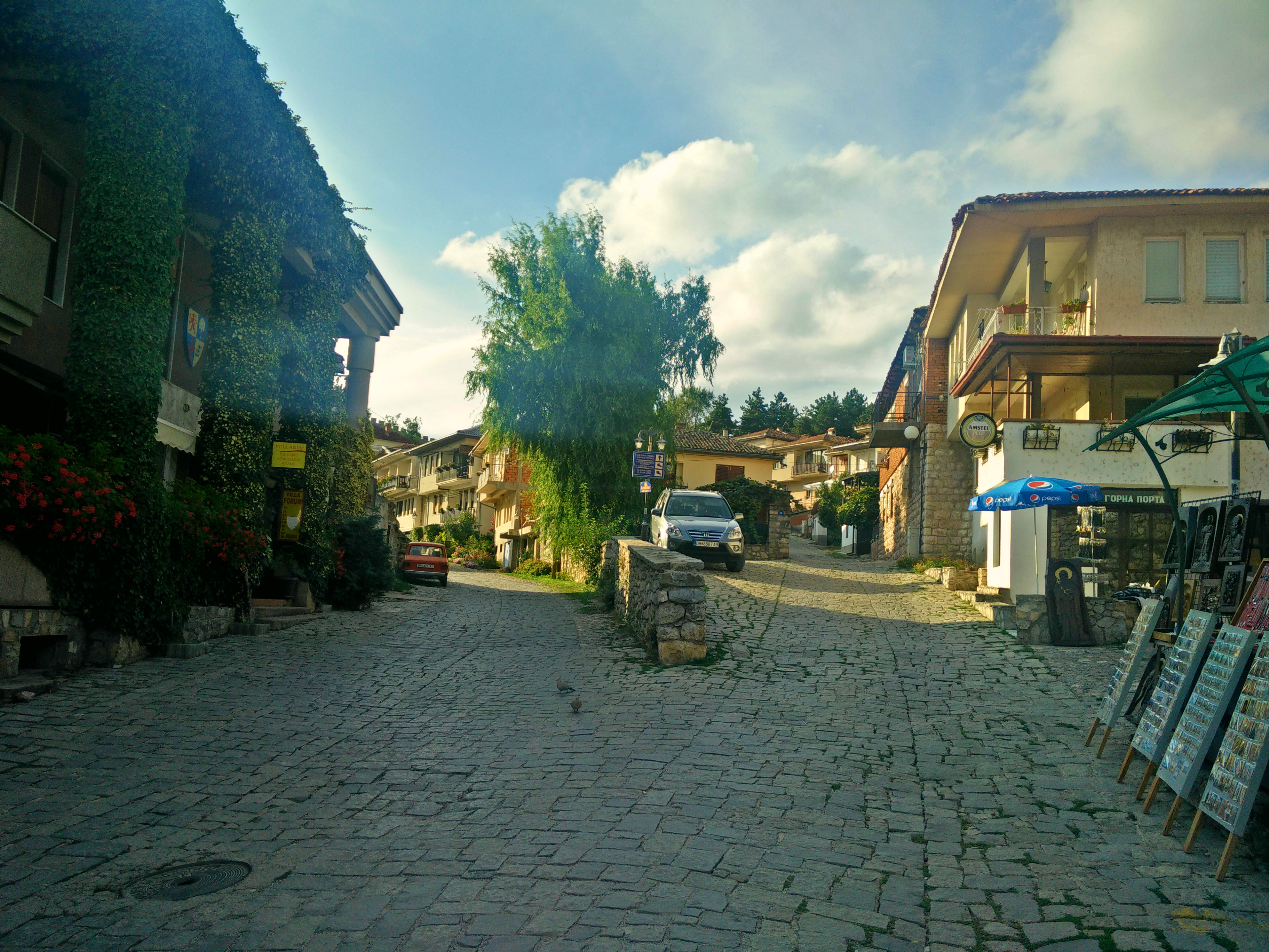 Стар дел од Охрид (Лево Антички, Десно Самоилова тврдина)